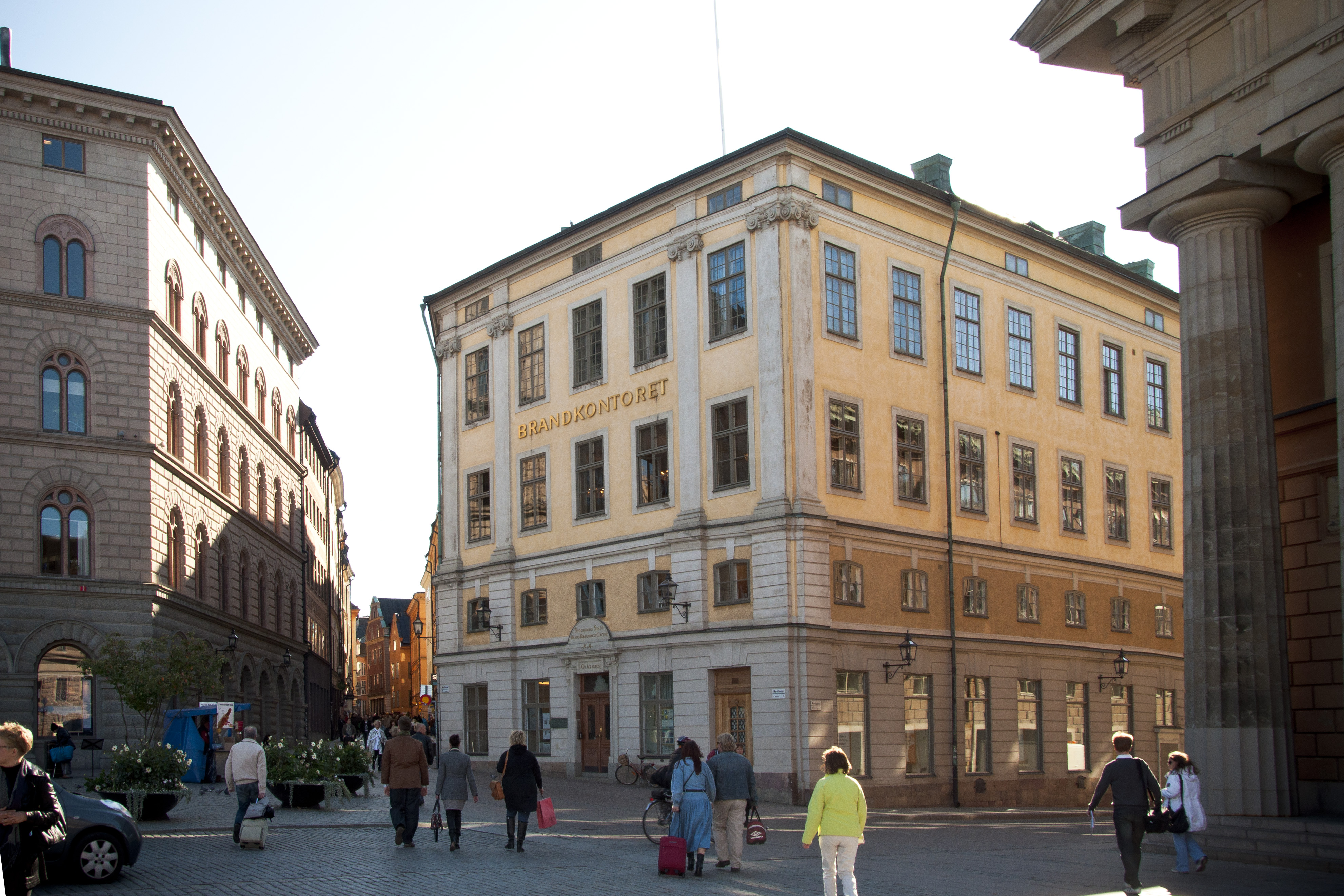 Brandkontoret